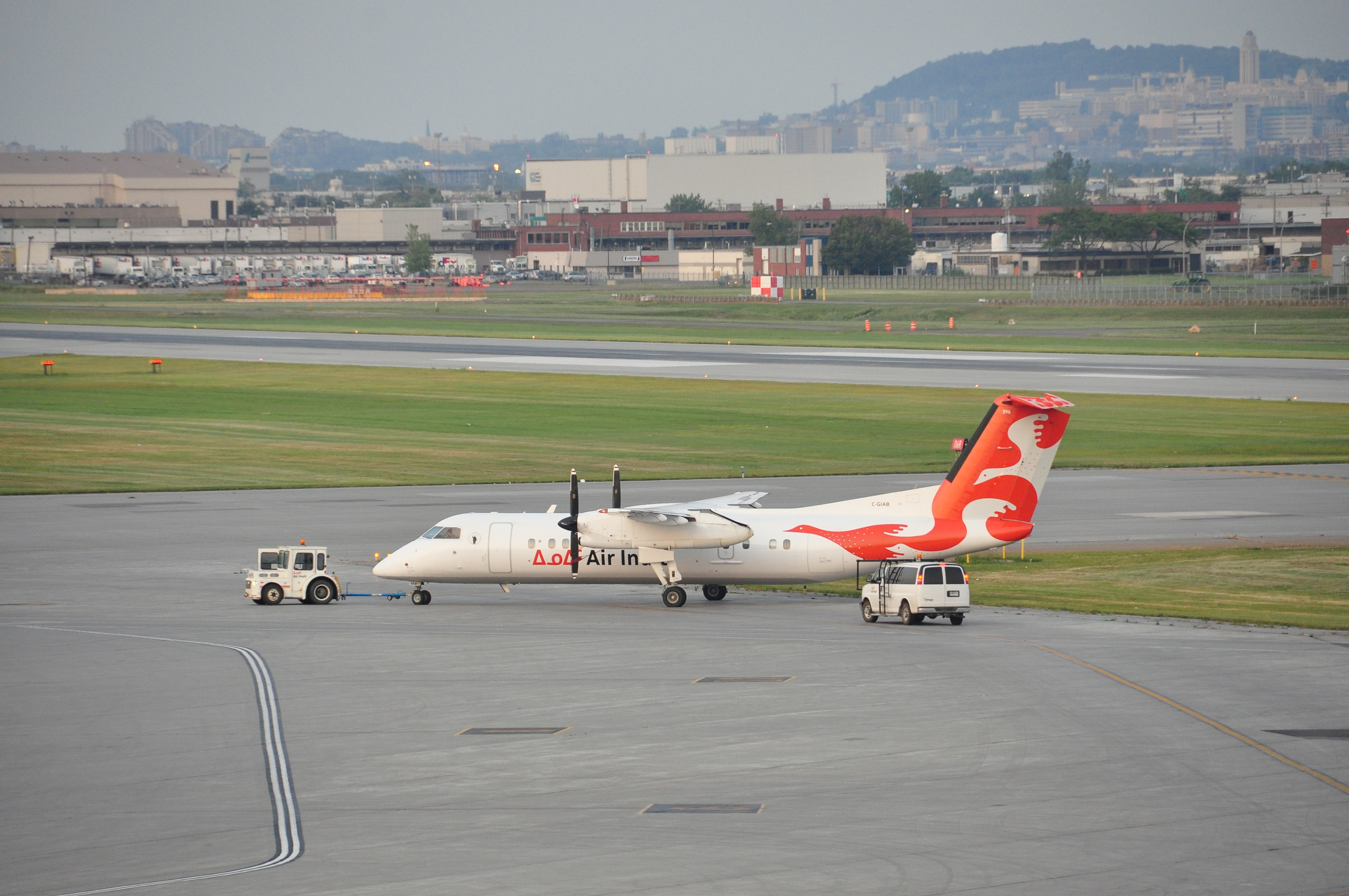 YUL Montréal-Trudeau